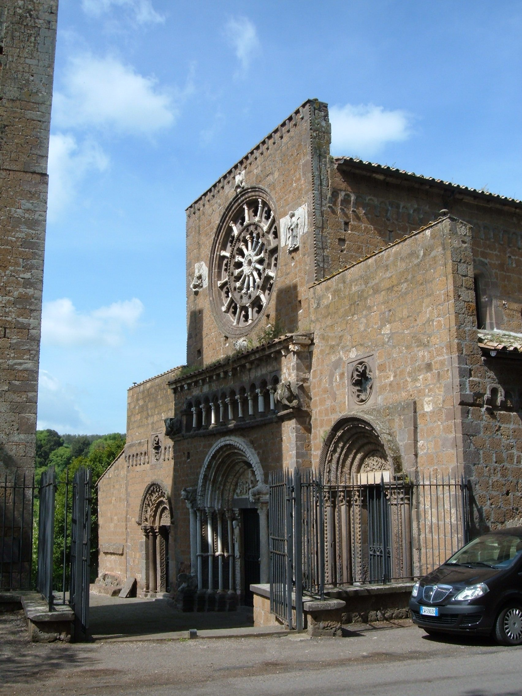 Basilica di Santa Maria Maggiore, a Tuscania, provincia di Viterbo.